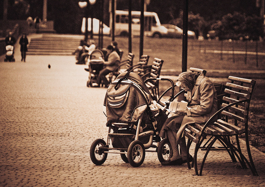 Красношкольная набережная, май 2009 года